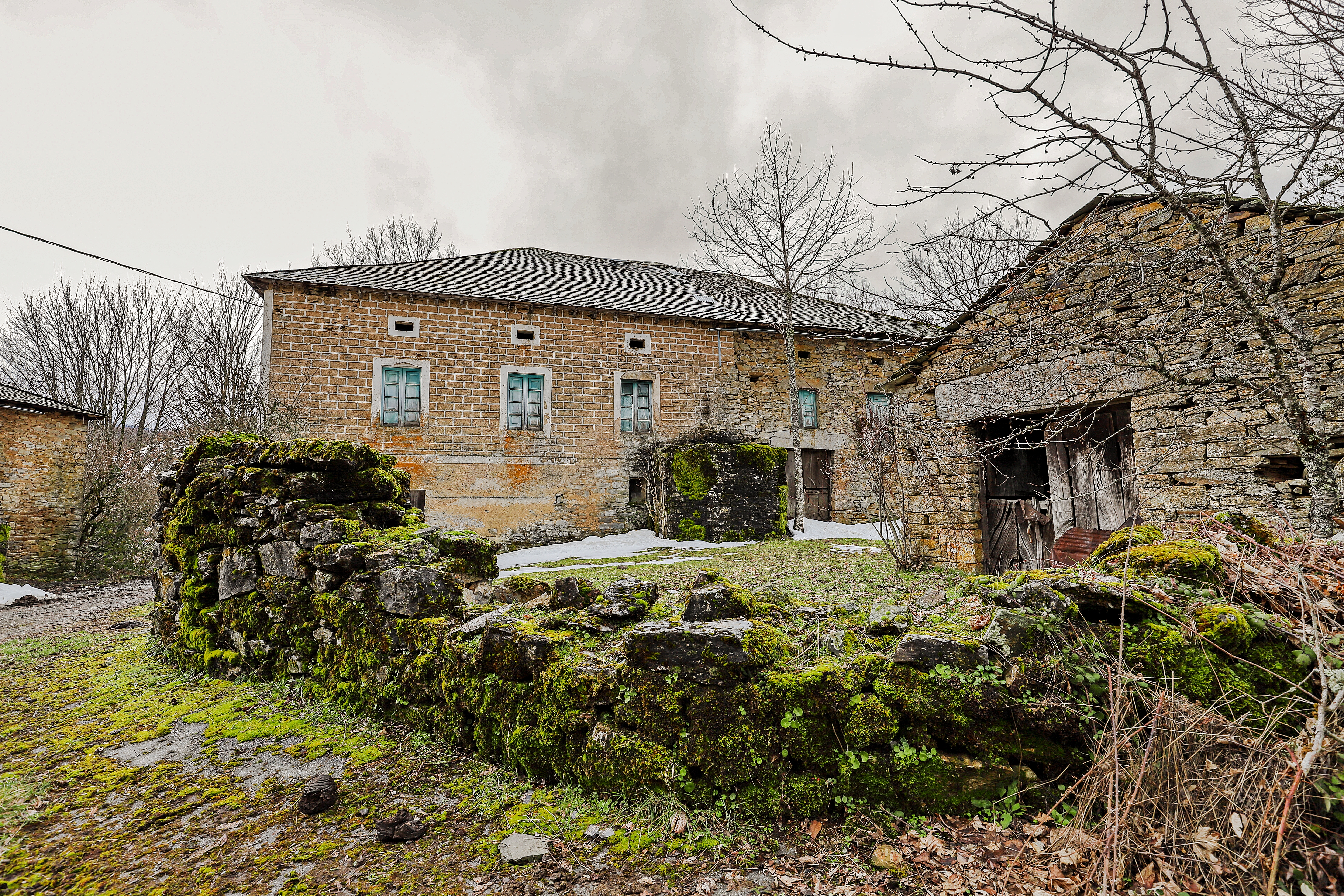 La Treita es un despoblado que pertenece al municipio de Vega de Valcarce, comarca de El Bierzo, provincia de León.